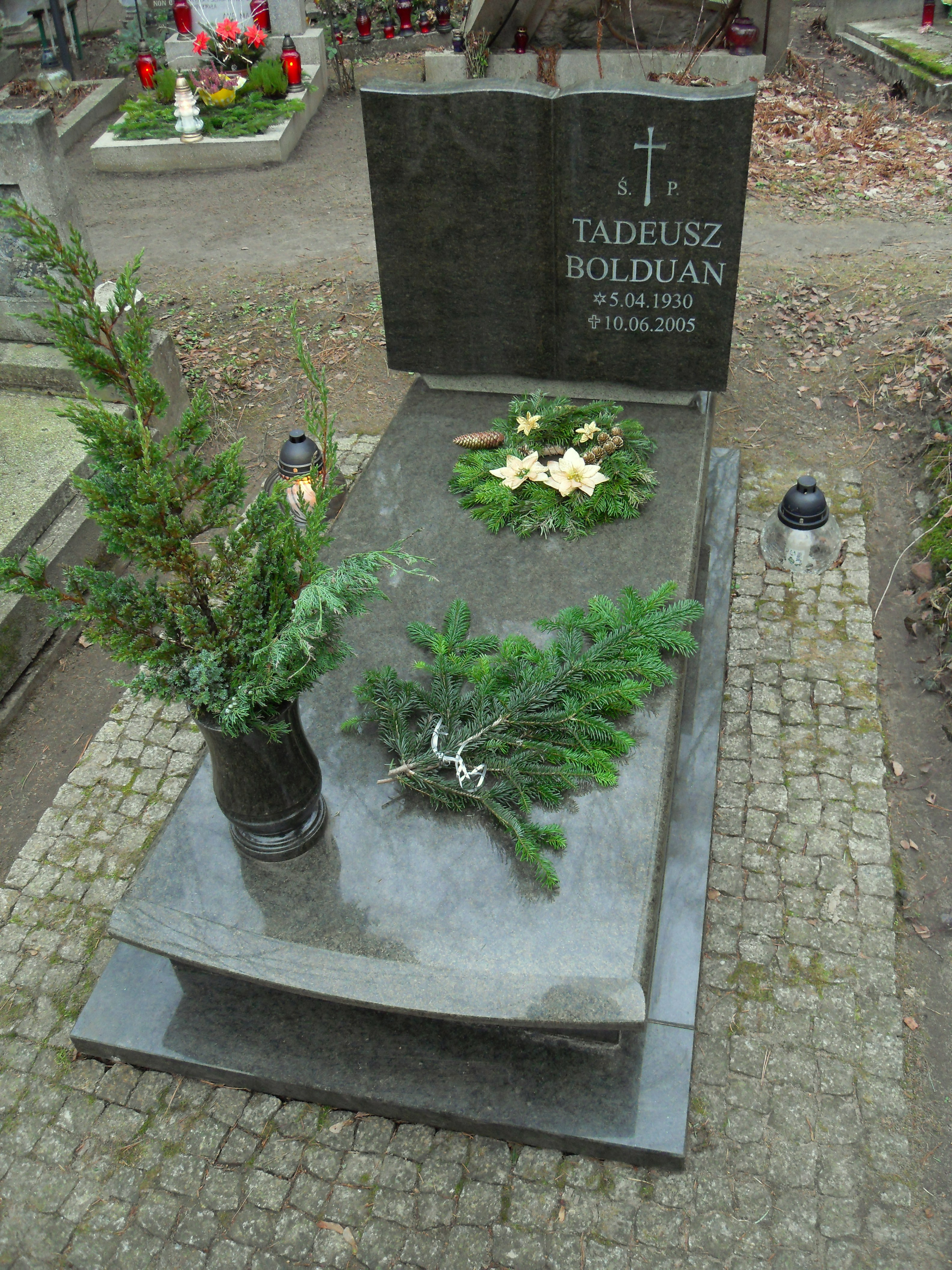 Gdańsk Wrzeszcz Górny. Cmentarz Srebrzysko, grób Kaszuby i dziennikarza Tadeusza Bolduana (1930-2005).